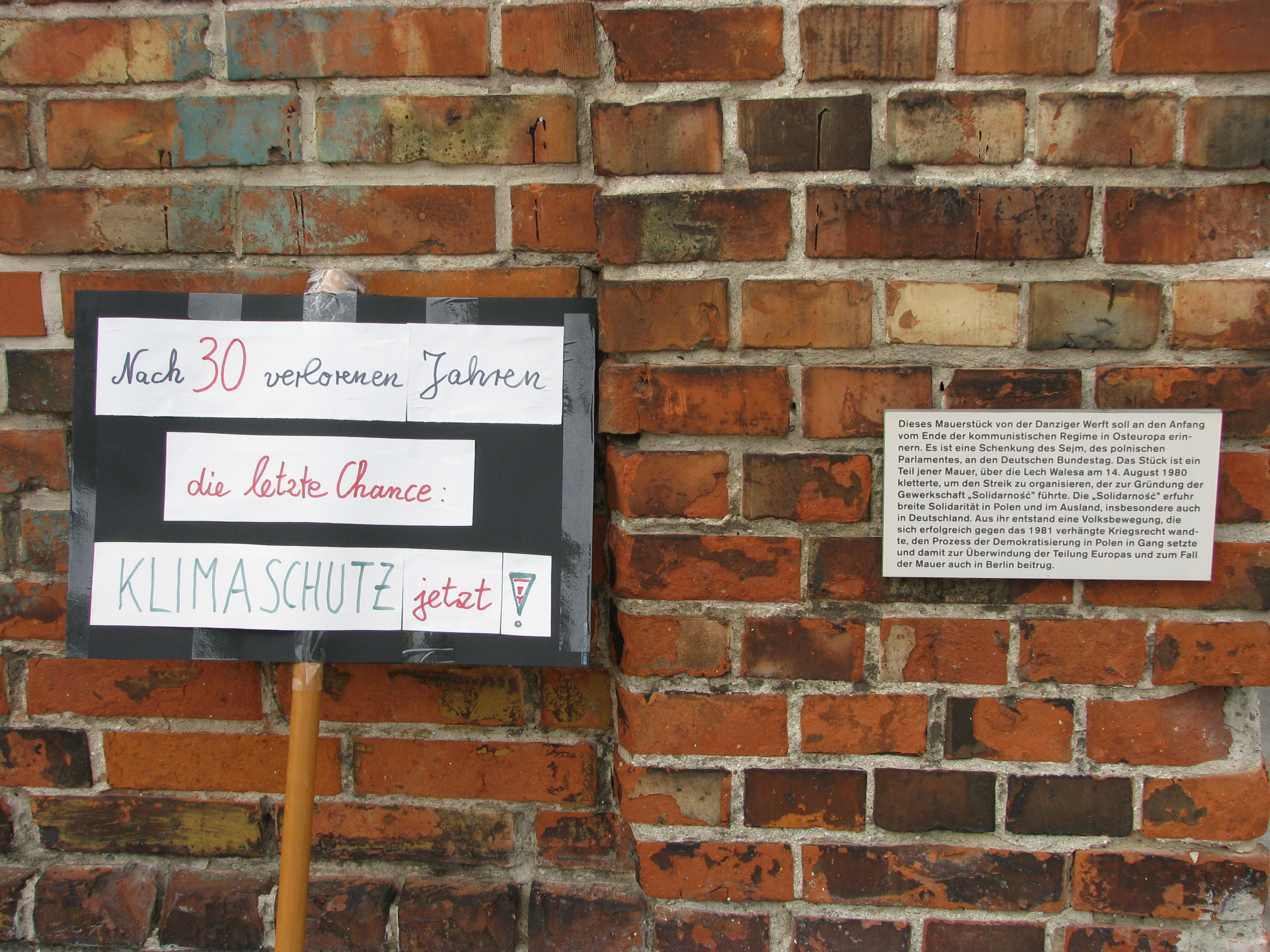 Demonstrationsplakat vom 20. September 2019 in Berlin neben Gedenktafel an der Rückseite des Reichstagsgebäudes